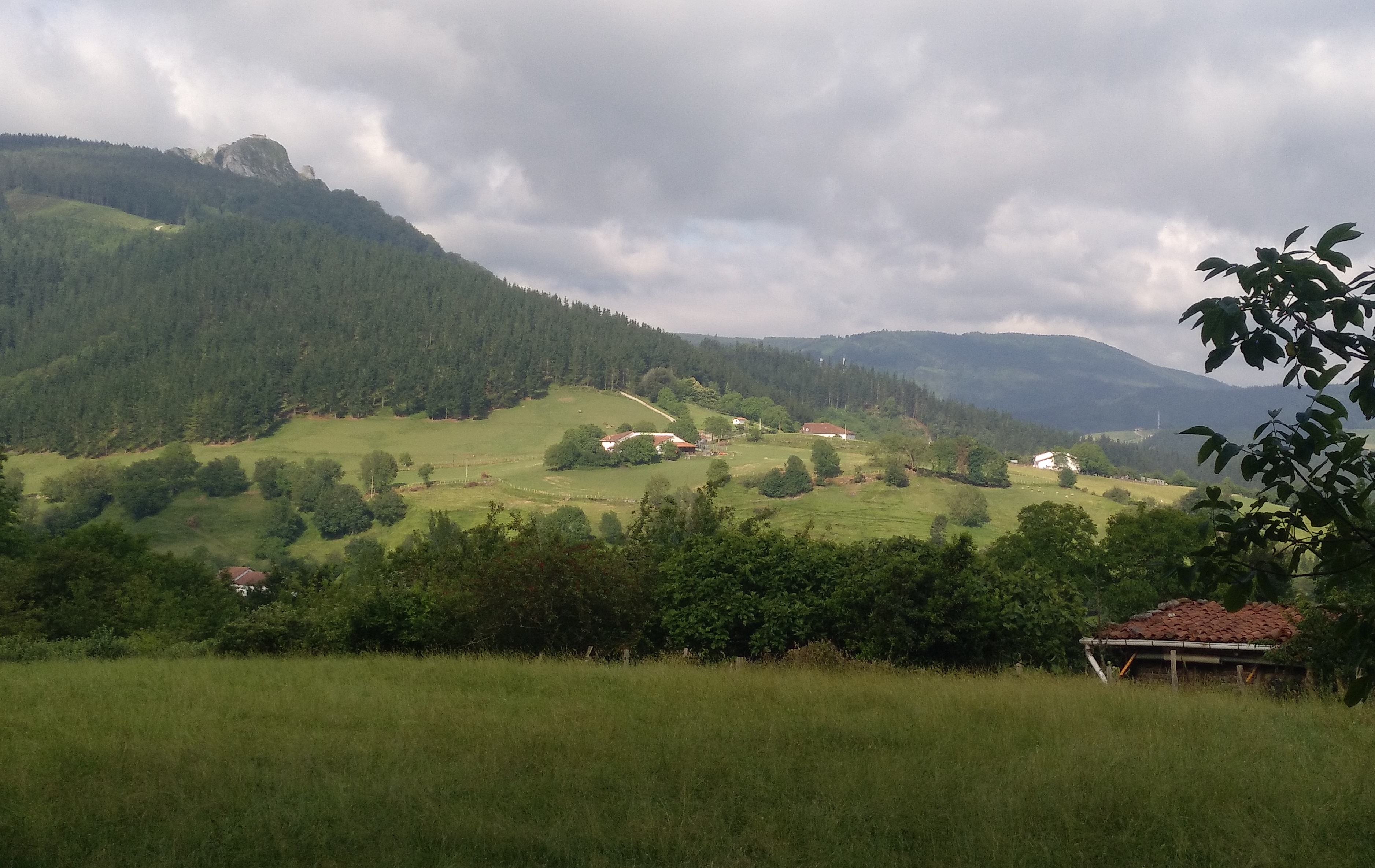 Aitzorrotz mendia eta Bolibar auzoa azpian